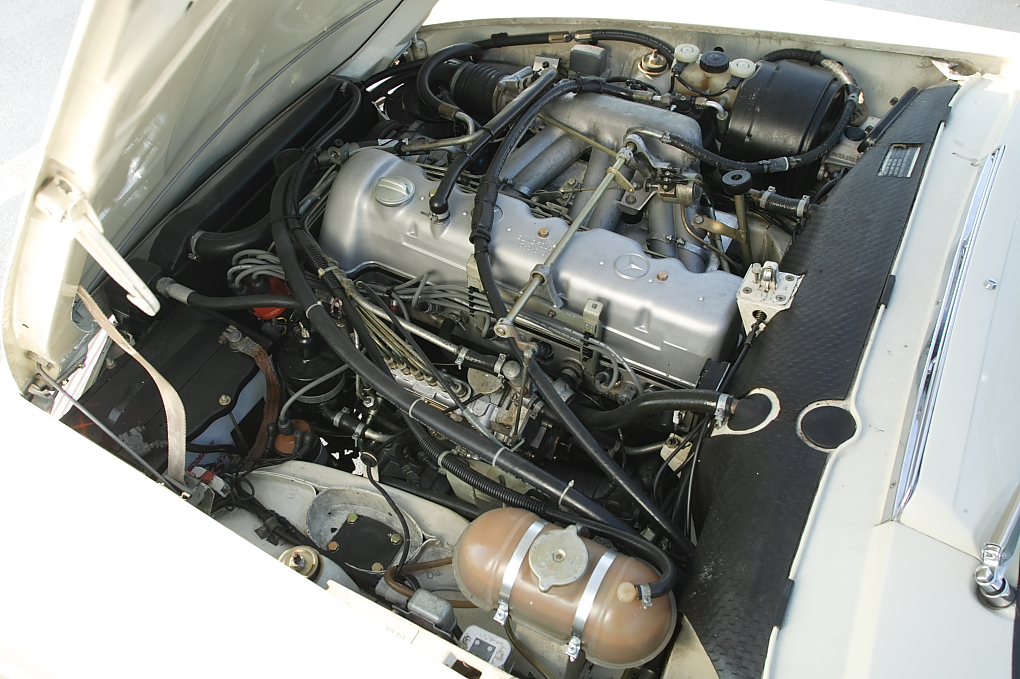 Mercedes-Benz W113 230SL I6 petrol engine